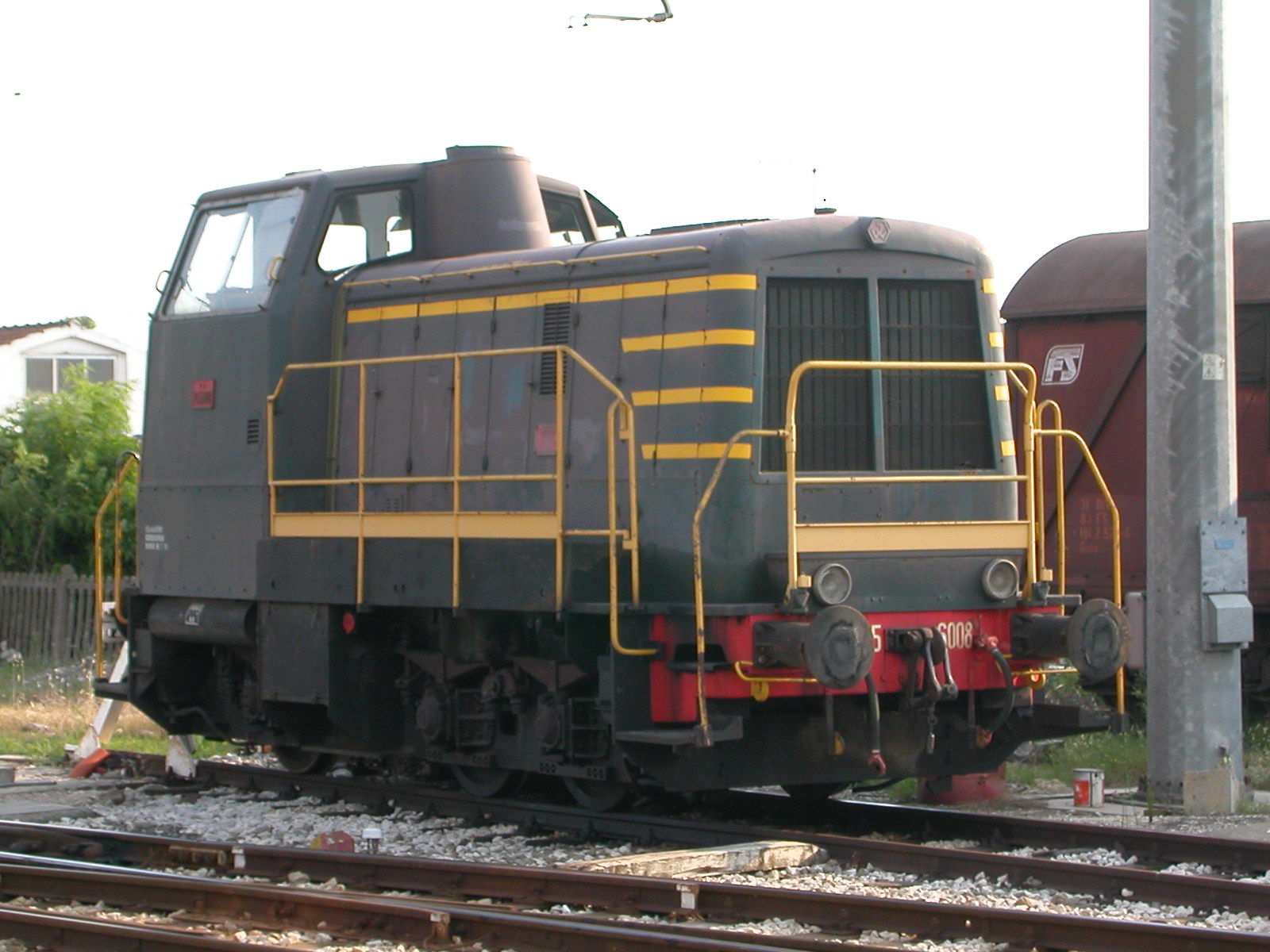 Locomotrice Diesel da manovra 245.6008 in sosta a Rovigo